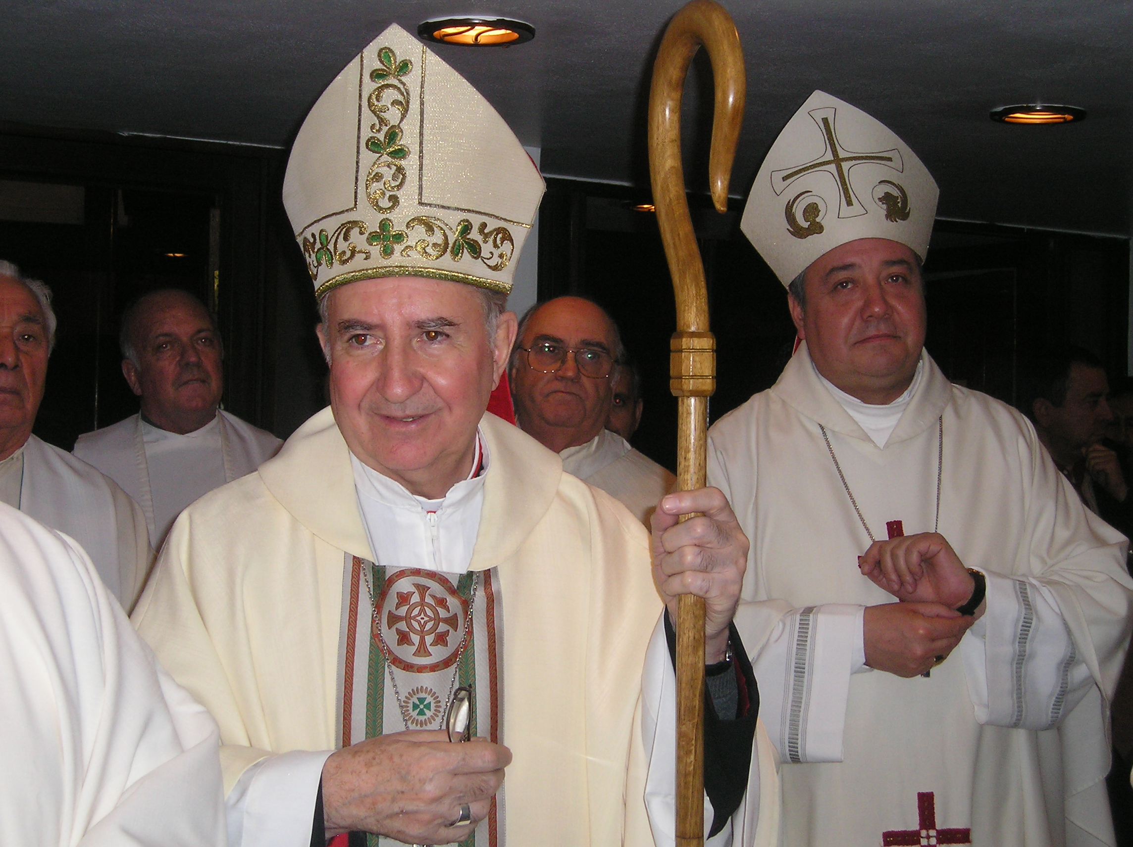 Foto obtenida por el autor del artículo